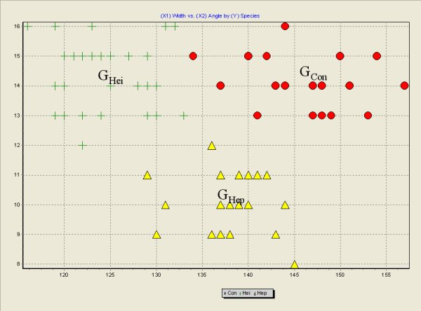 Nuages de points conditionnels dans le plan formé par deux descripteurs -- Fichier FLEA BEETLES